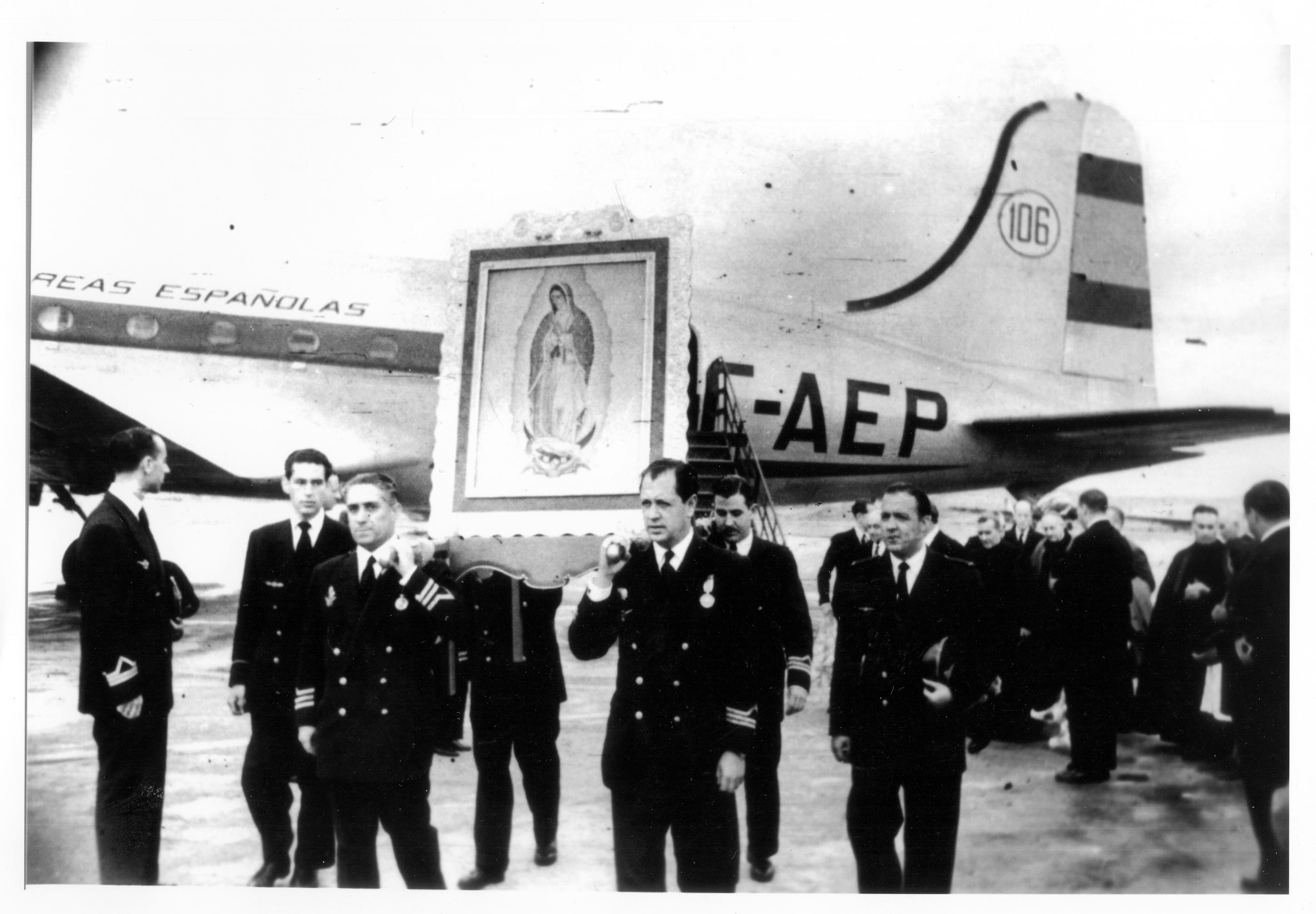 Inauguración de la línea de Madrid-México en la pista del aeropuerto de México, la tripulación posa junto al estandarte de la virgen de Guadalupe, que presidió y fue obsequio en el acto conmemorativo de la inauguración de la nueva línea. 1 de marzo de 1950. A banner depicting Mexico's Virgen of Guadalupe was the centerpiece of the inauguration of Iberia's Madrid-Mexico City route on March 1, 1950. Apertura linea Madrid-Messico in Messico pista dell'aeroporto, l'equipaggio posa con la bandiera della Vergine di Guadalupe, che ha presieduto ed era presente alla cerimonia per commemorare l'apertura della nuova linea. 1 marzo 1950. Inauguration de la connexion Madrid-Mexico sur la piste de l'aéroport de Mexico, l'équipe pose aux cotés de l'étendart de la vierge de Guadeloupe lors de l'acte commémoratif de l'inauguration de la nouvelle ligne. Le 1er mars 1950. Inauguração da conexão entre Madri e México no dia primeiro de março de 1950, sobre a pista do aeroporto mexicano, onde a equipe posa junto ao estandarte com a imagem da Virgem de Guadalupe durante o ato comemorativo da nova linha. Einweihung der Strecke Madrid-México auf der Piste des mexikanischen Flughafens. Das Flugpersonal posiert neben der Madonna Guadalupe, die das Gastgeschenk des Einweihungsakts der neuen Linie, war. 1. März 1950.